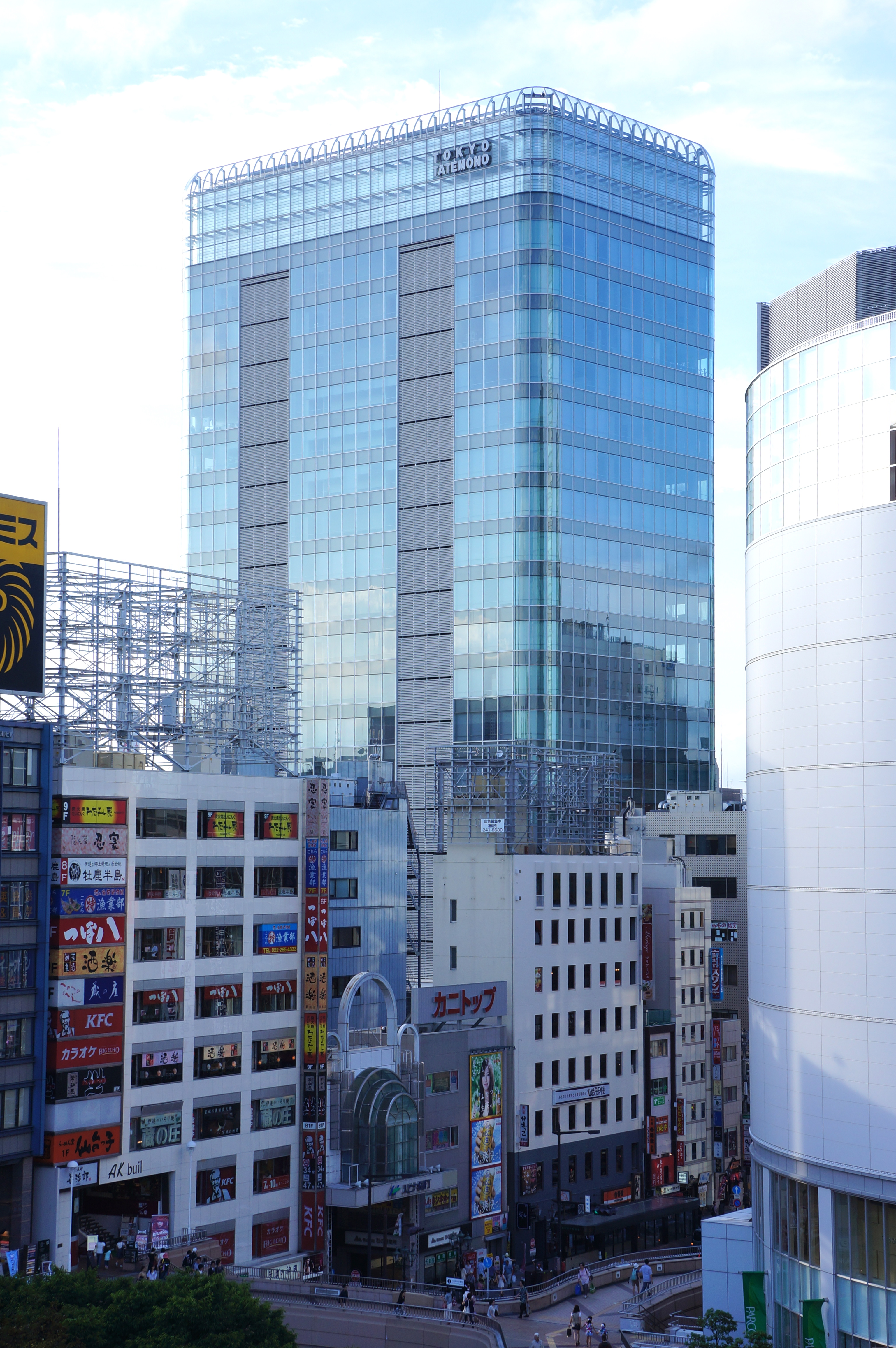 東京建物仙台ビル仙台駅方面から